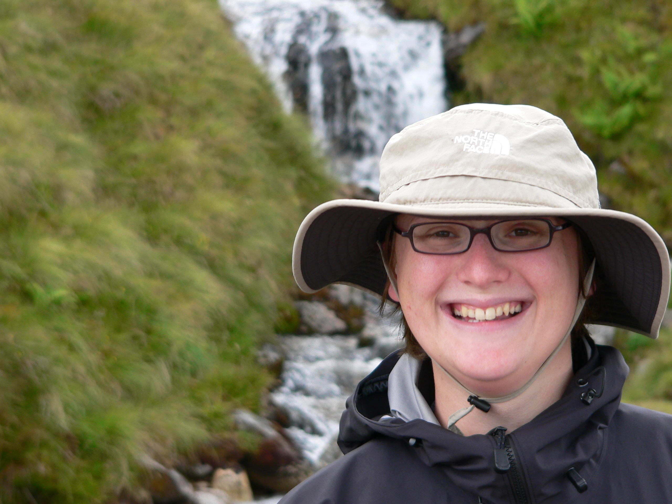 Nikki Gordon-Bloomfield